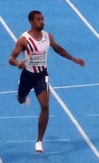 Młodzieżowe Mistrzostwa Europy w Lekkoatletyce U23 w Bydgoszczy 13-16 lipca 2017, finał biegu na 200 m mężczyzn